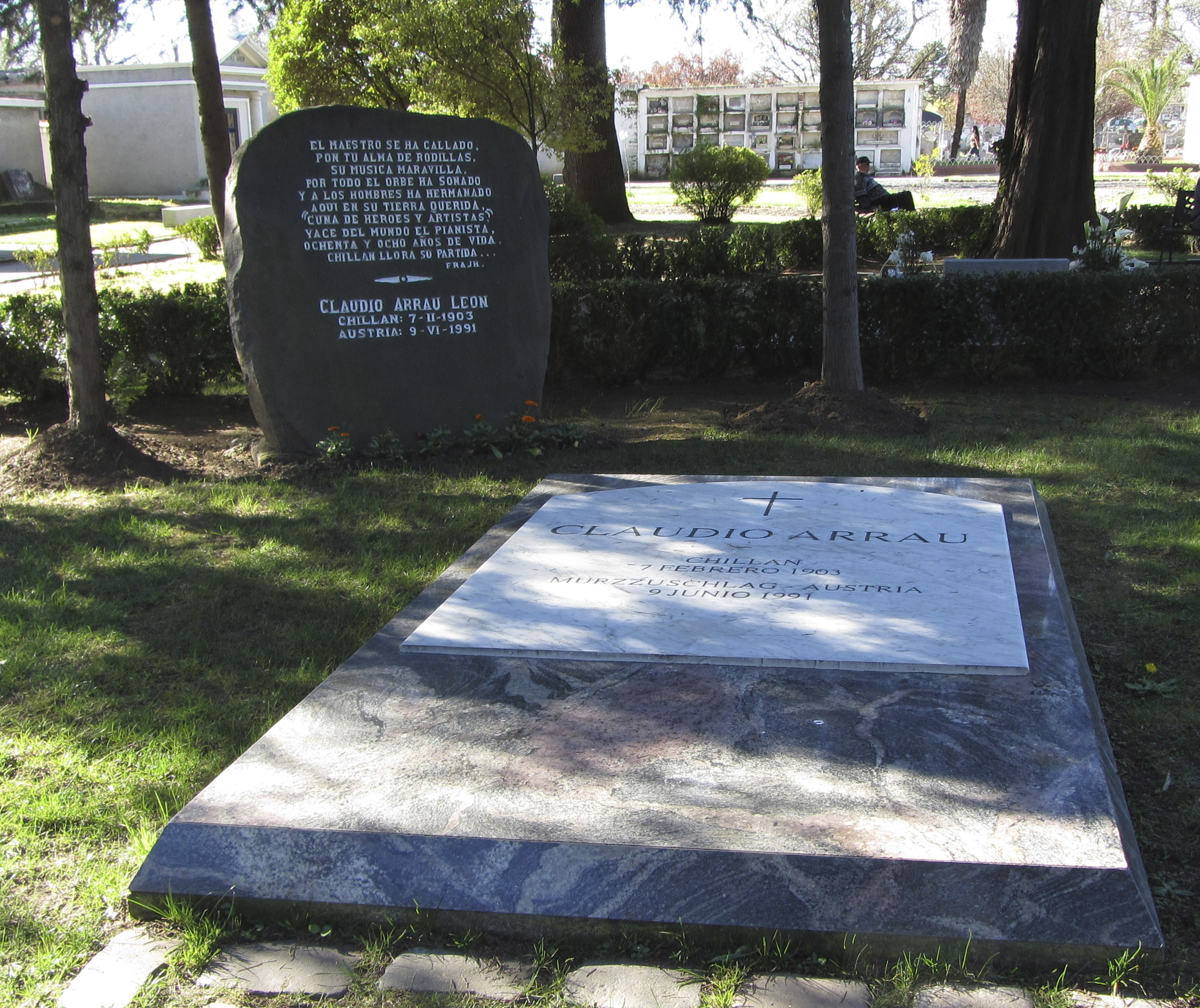 Tumba de Claudio Arrau en el Parque de los Artistas del Cementerio Municipal de Chillán, Chile. Septiembre de 2012.